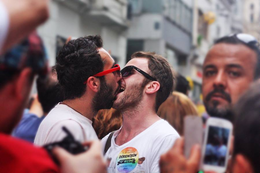 LGBT Onur Haftası, 21. LGBT Onur Yürüyüşü, 2013, Taksim, İstanbul.